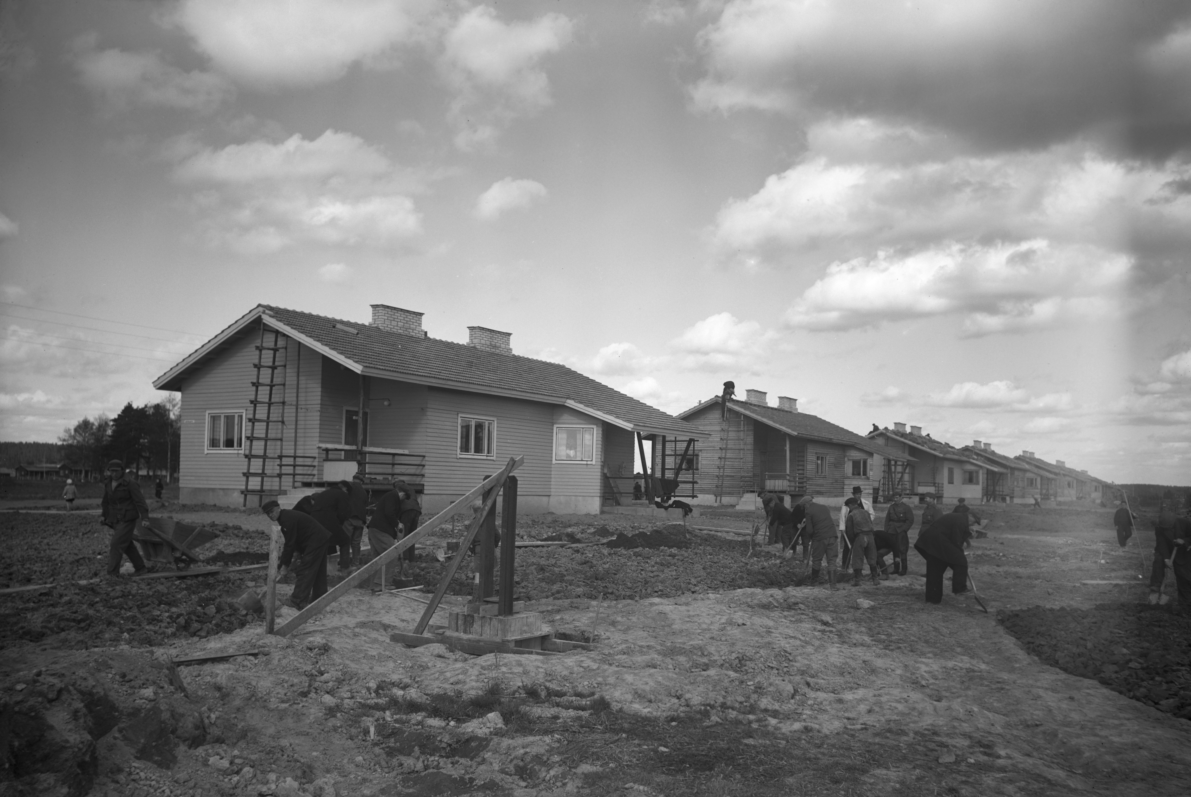 Kuva on otettu Asevelikylän rakennustalkoista Jokipohjantieltä. Asevelikylässä käytetyn talotyypin suunnitteli arkkitehti Alvar Aalto.